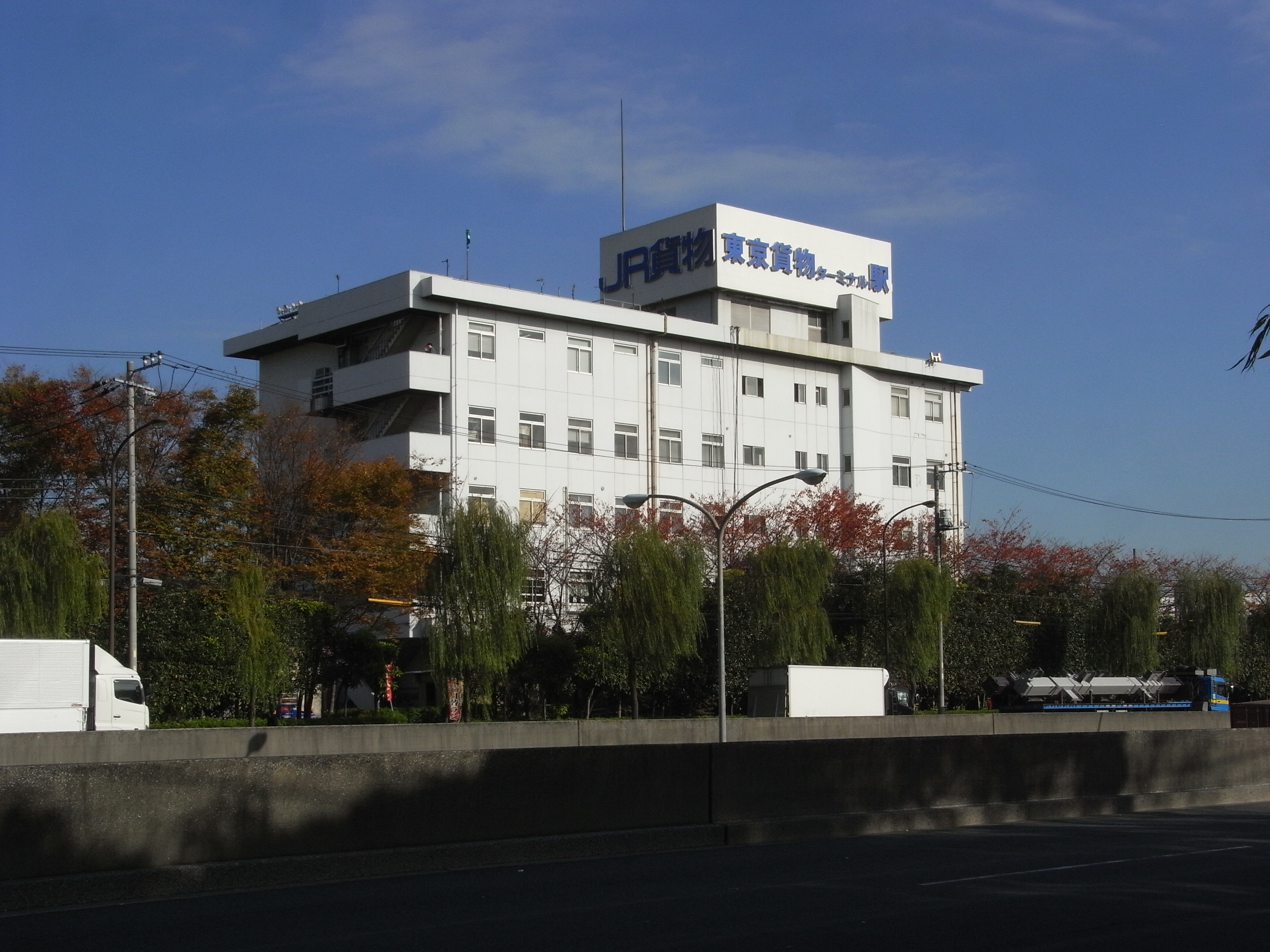 東京貨物ターミナル駅 駅本屋